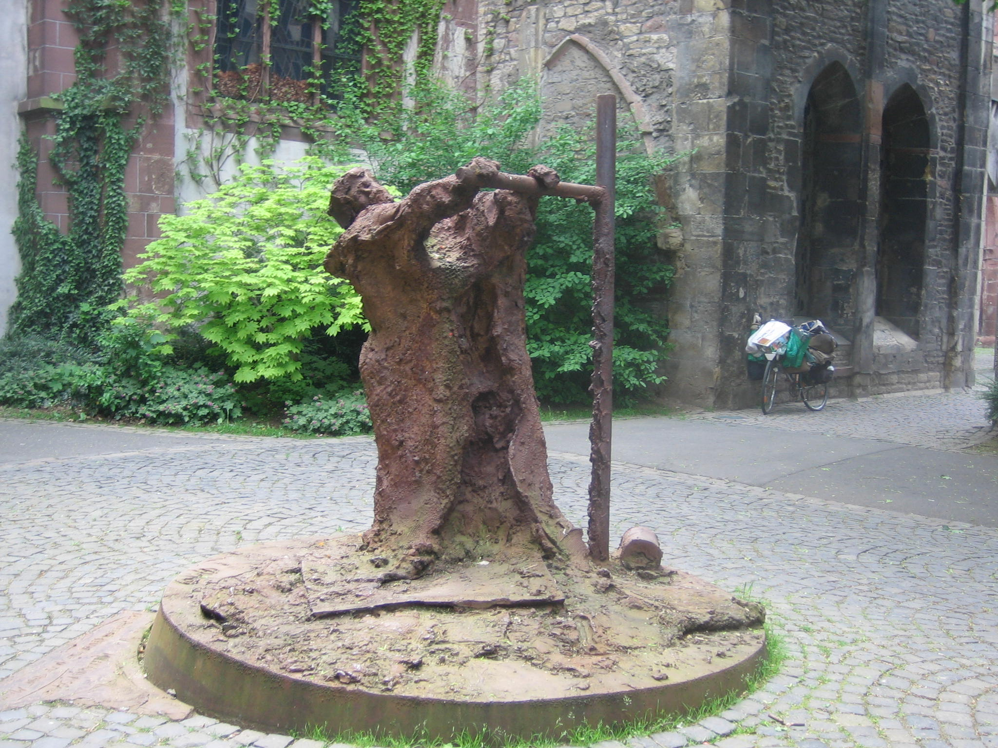 Gutenberg Statue vor der Christophskirche (seine Taufkirche) in Mainz. Künstler Karlheinz Oswald